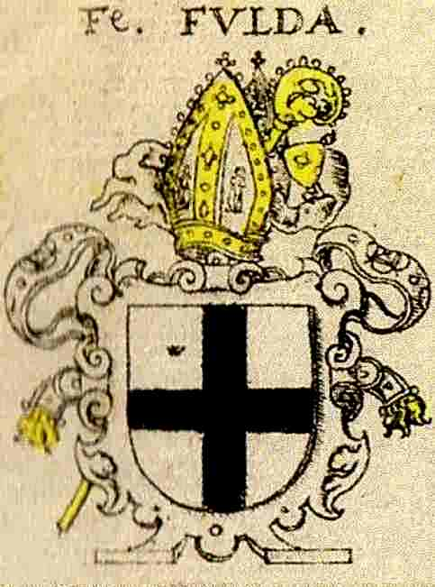 Wappen des Klosters und Bistums Fulda nach Siebmachers Wappenbuch